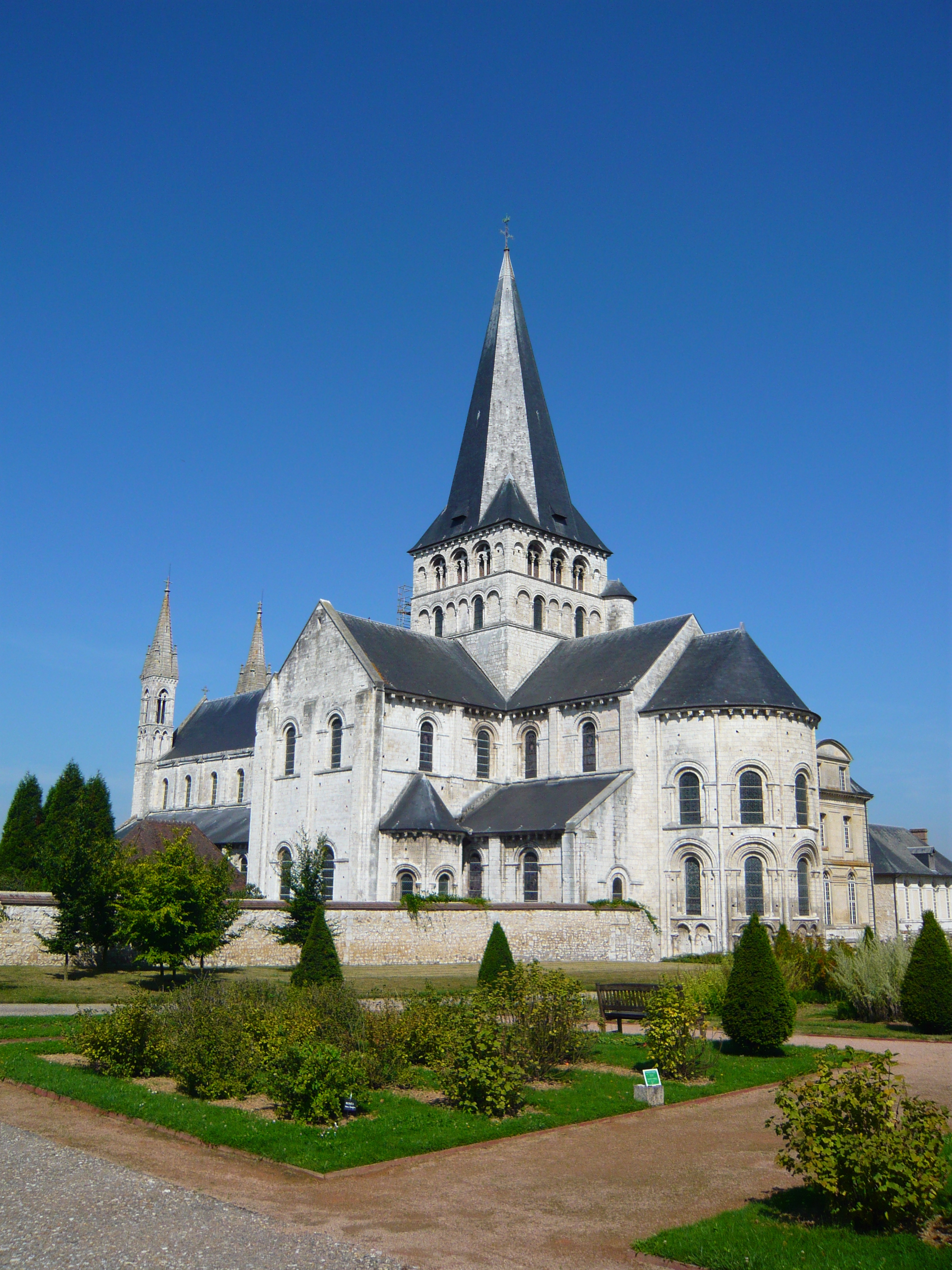 Vue extérieure de l'Abbatiale Saint-Georges de Boscherville